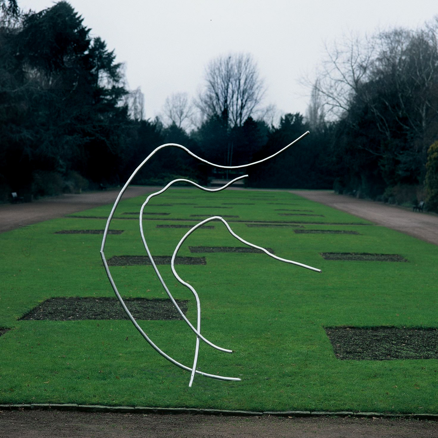 Tanz der Winde Maße: 300 x 255 x 220cm, Edelstahl, während einer Ausstellung im Nordpark Düsseldorf